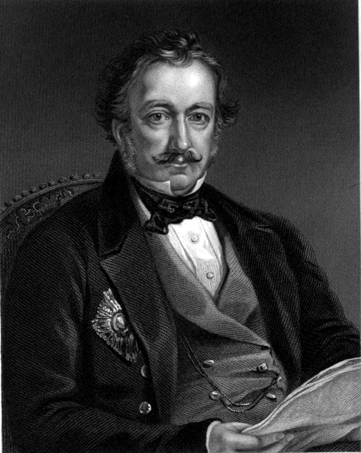 Sir Henry Pottinger, 1st Baronet, GCB, PC (1789–1856)